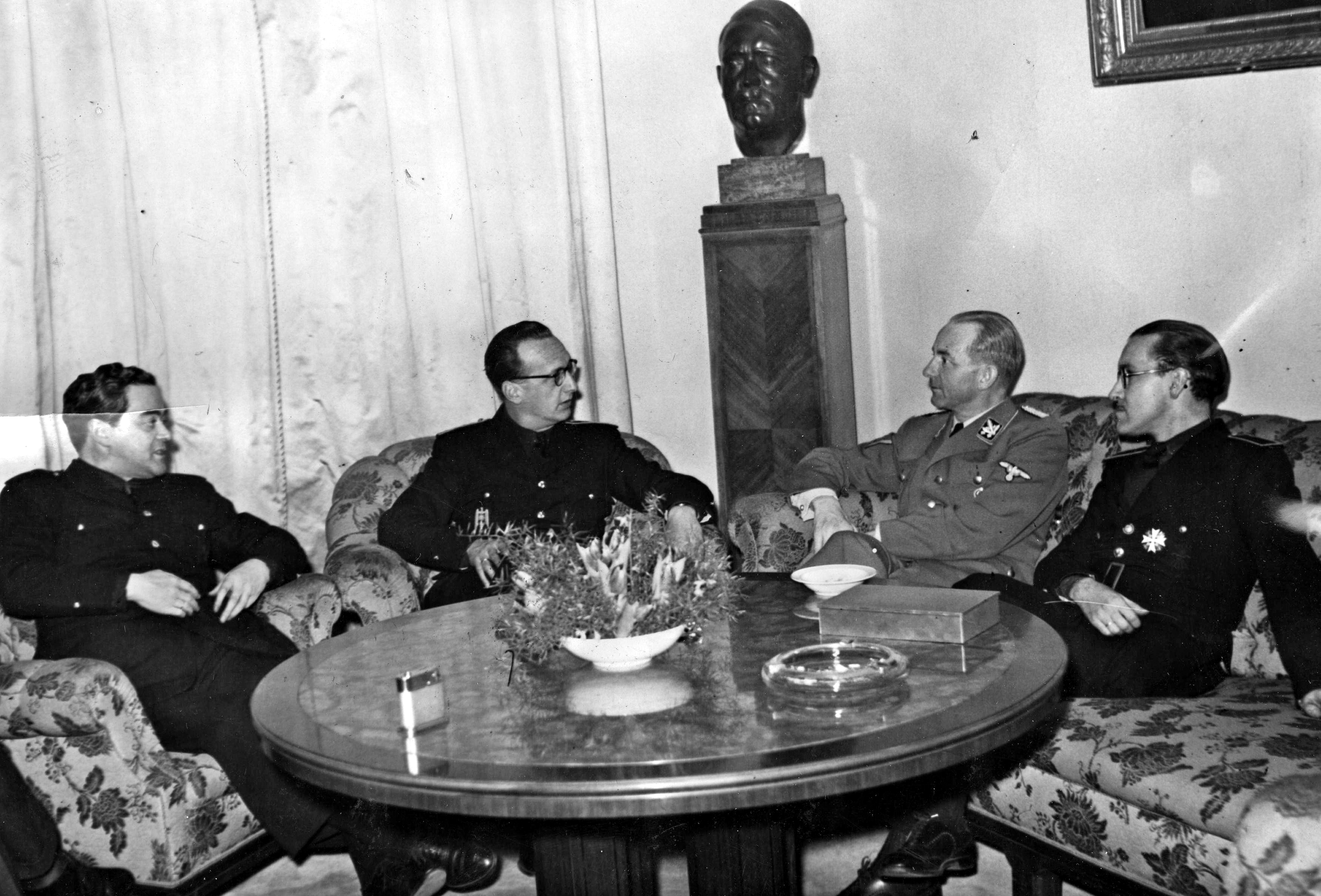 El vicesecretario de Educación Popular Gabriel Arias-Salgado (segundo por la izquierda) junto al jefe de prensa del Reich, Otto Dietrich, durante una visita a Berlín, en 1943.